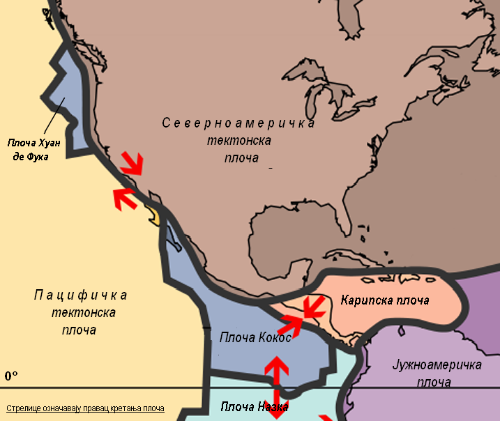 Карта тектонских плоча Мексика на српском језику.